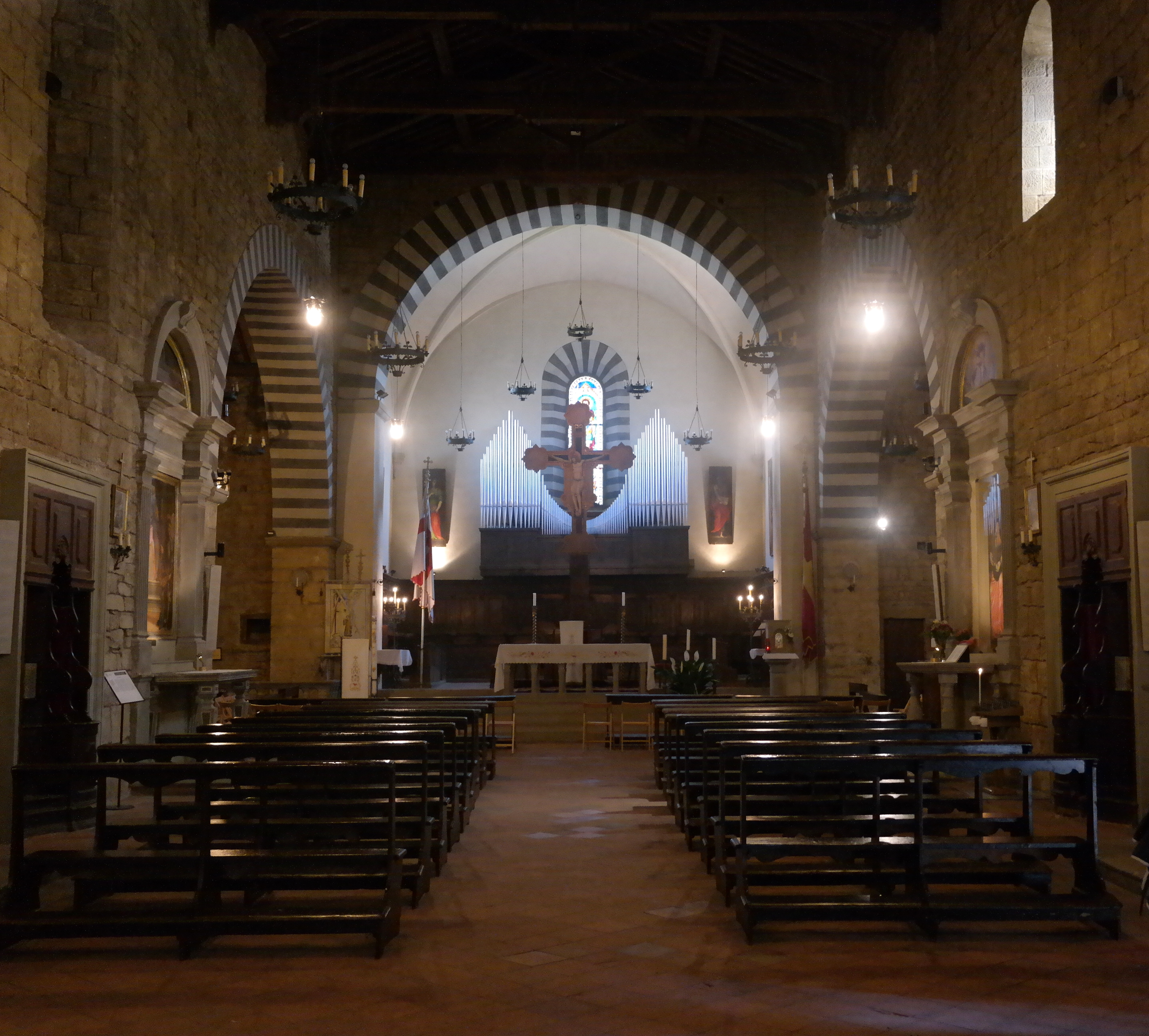 Interno della Chiesa di San Fedele a Poppi